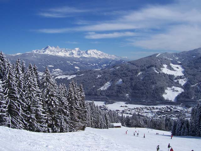 Flachau, Blick vom Berg herunter, im Hintergrund das Dachsteinmassiv.